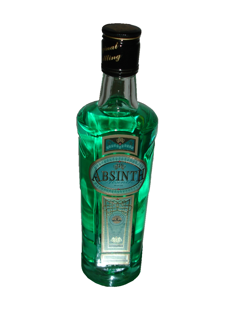 Absinth, czeski Absynt 80%